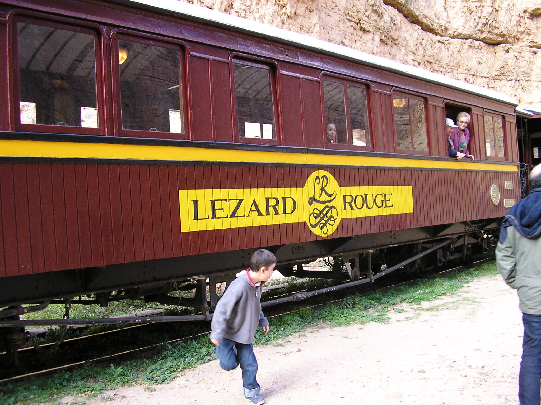 Photographie personnelle prise en décembre 2004 lors d'une halte du train touristique "Lézard rouge" entre Metlaoui et Redeyef. On peut observer l'une des 6 voitures de ce train autrefois utilisé pour l'agrément du bey de Tunis.